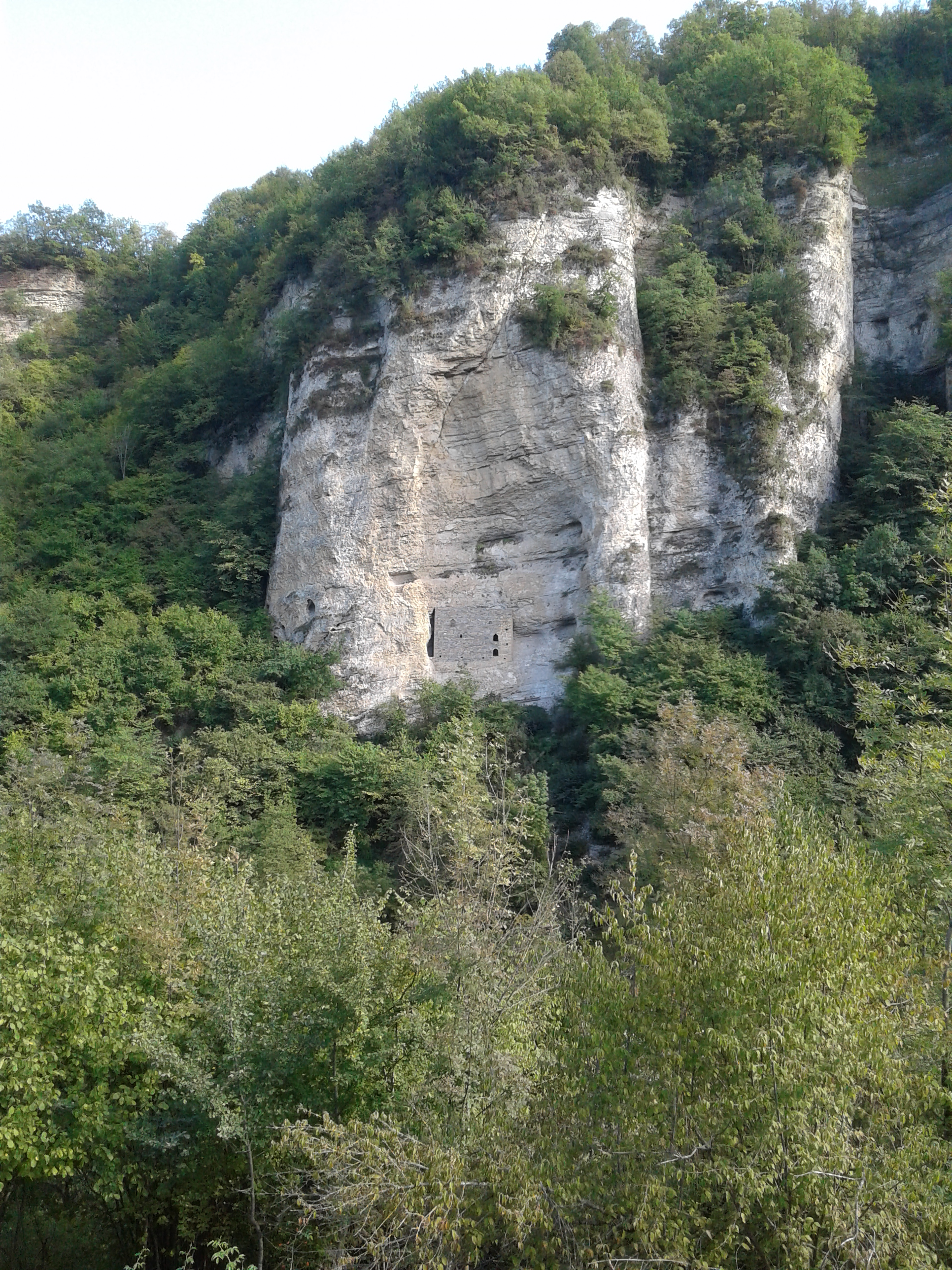 Башня рядом с Нихалоевскими водопадами